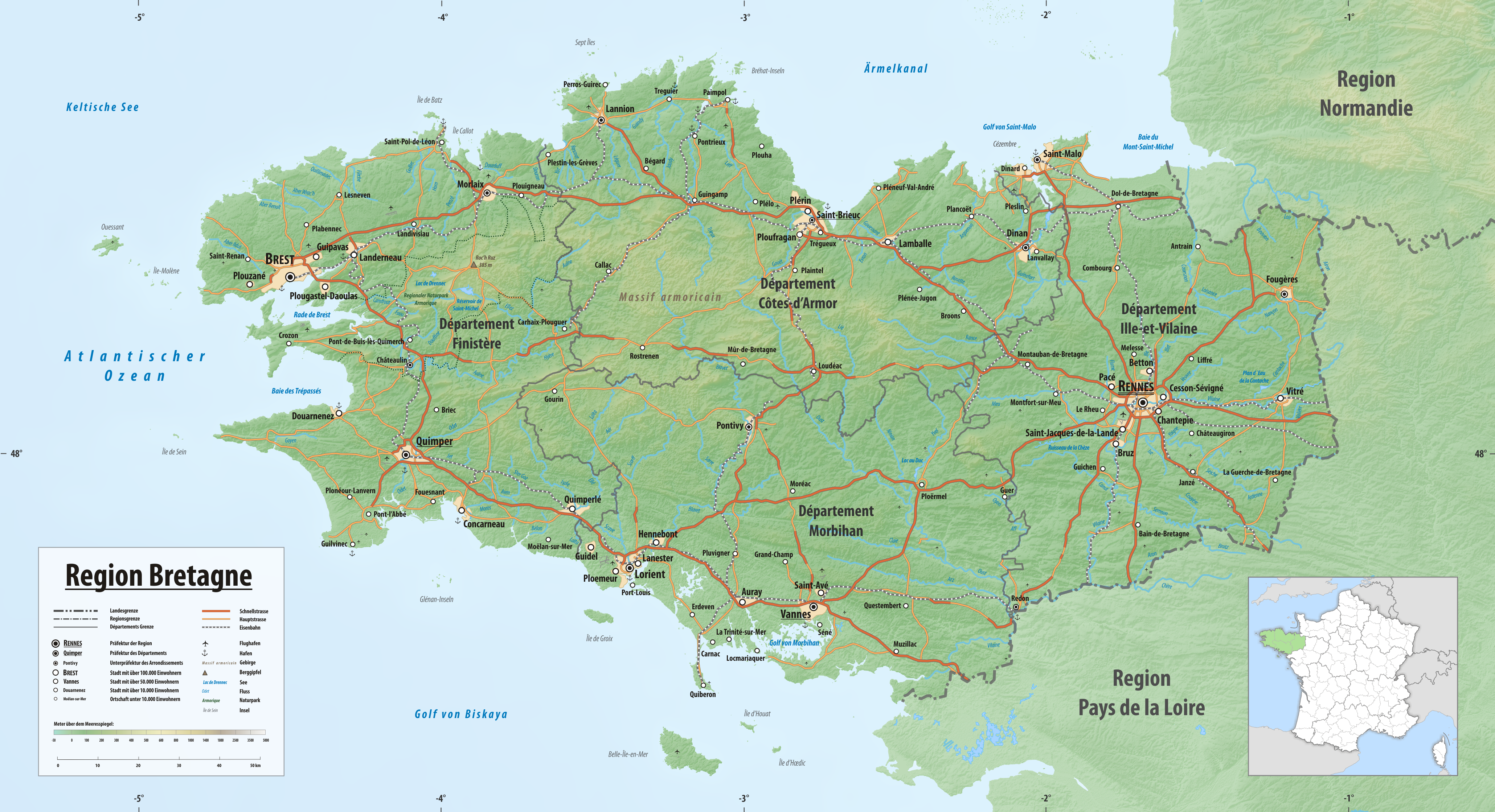 Reliefkarte der Region Bretagne Topographischer Hintergrund: NASA Shuttle Radar Topography Mission (public domain). SRTM3 v.2.